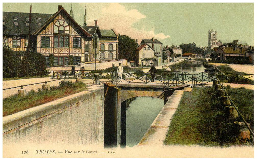 Ecluse des Bas-Trévois; écluse disparue du canal de la Haute-Seine. Elle se trouvait sur l'actuel boulevard Jules Guesde à Troyes.